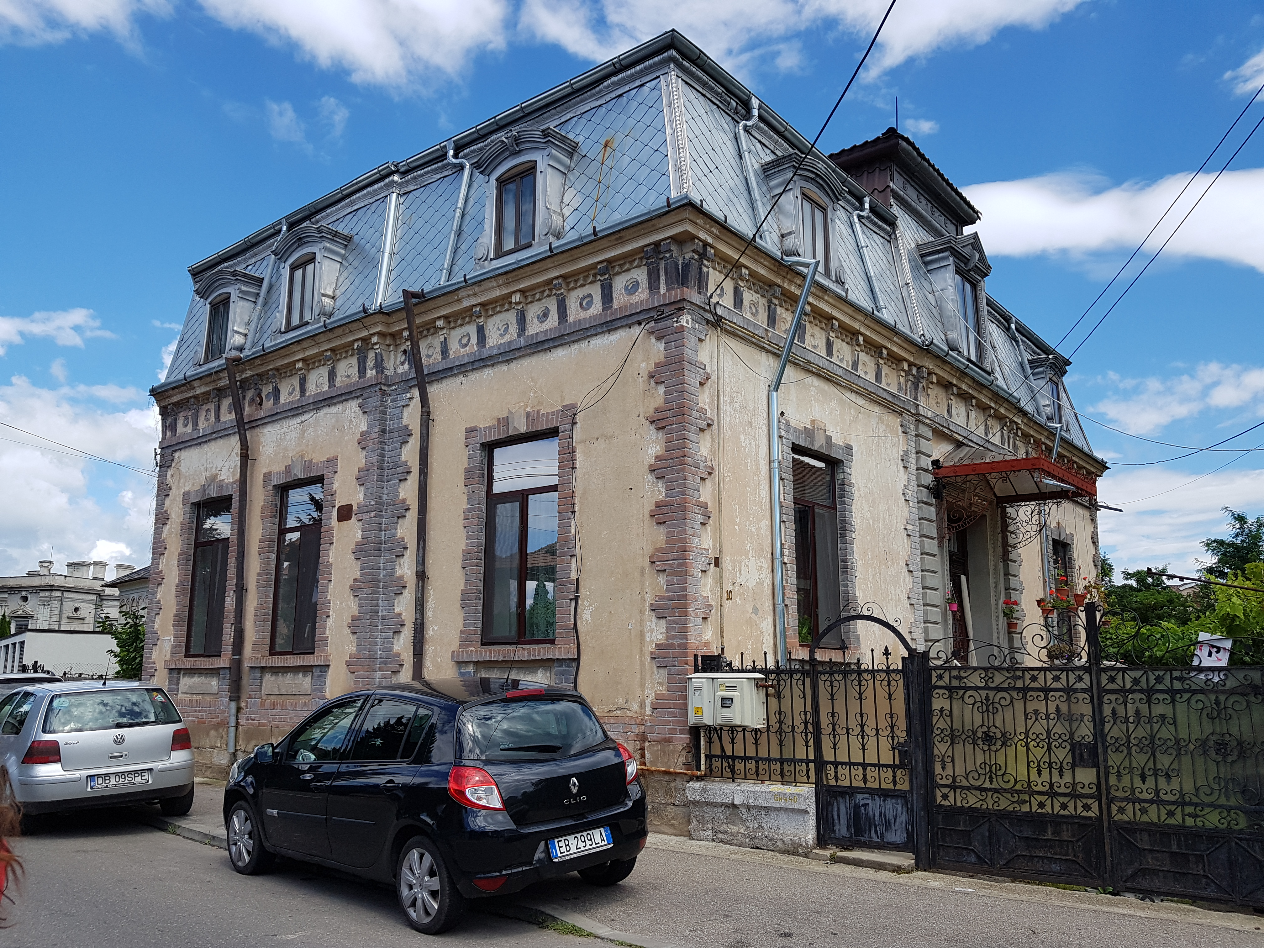 Casa Ștefan Radian